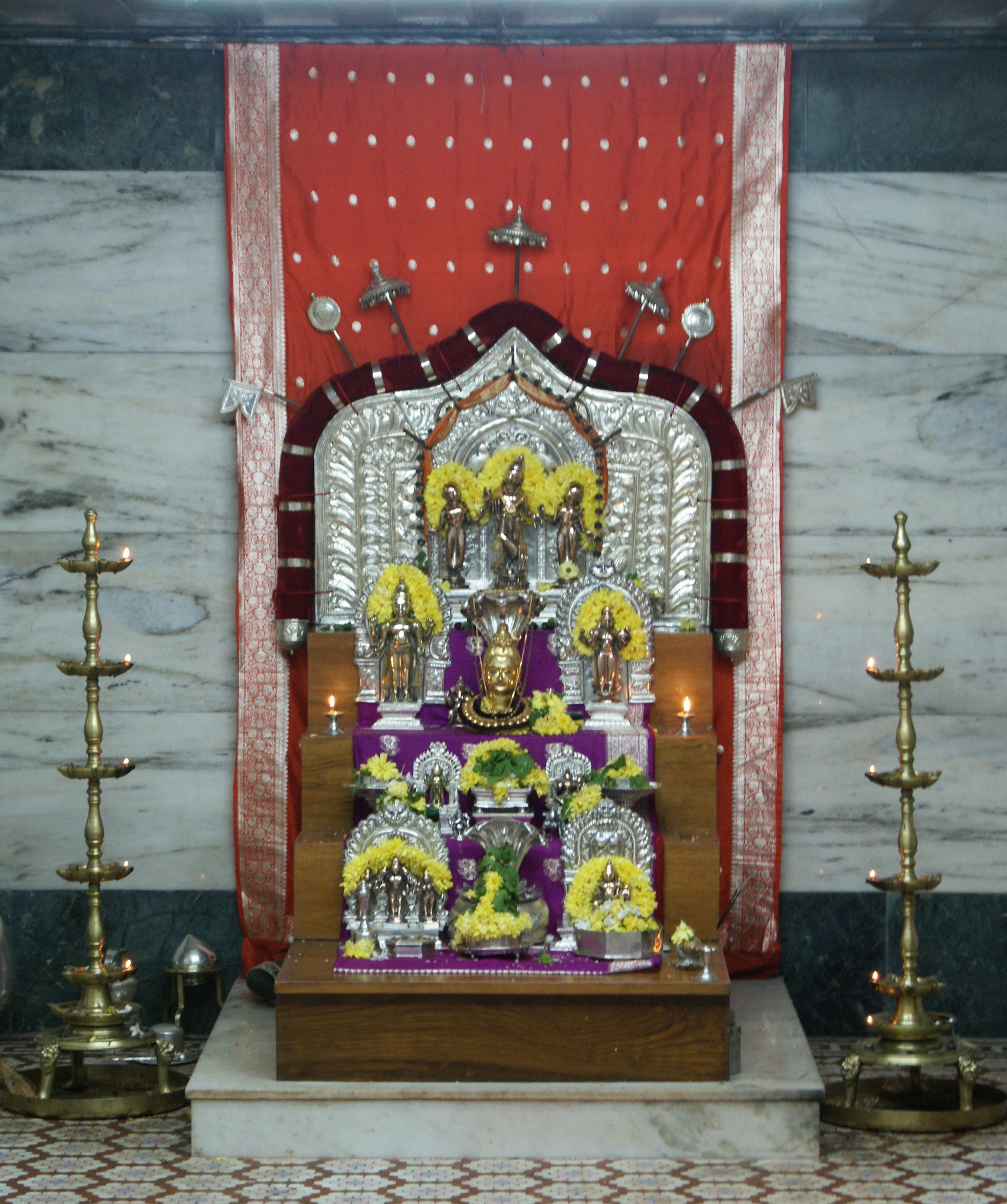 Kavale Mutt Deity, Shri Bhavani Shankara